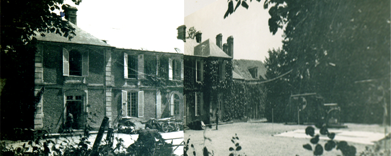 Deux photographies prises en 1944 par Captain JonhWAGSTAFF, officier médecin de la 225 Parachute Field Ambulance.